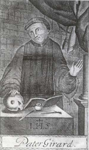 Portrait of Jean-Baptiste Girard, 1732. From: [Esprit-Joseph Chaudon]: Factum oder Vertheidigungsschrifft Marien Catharinen Cadiere, wider den Pater Johann Baptist Girard, einem Jesuiten ... Aus d. Französischen übersetzt. Köln 1732.